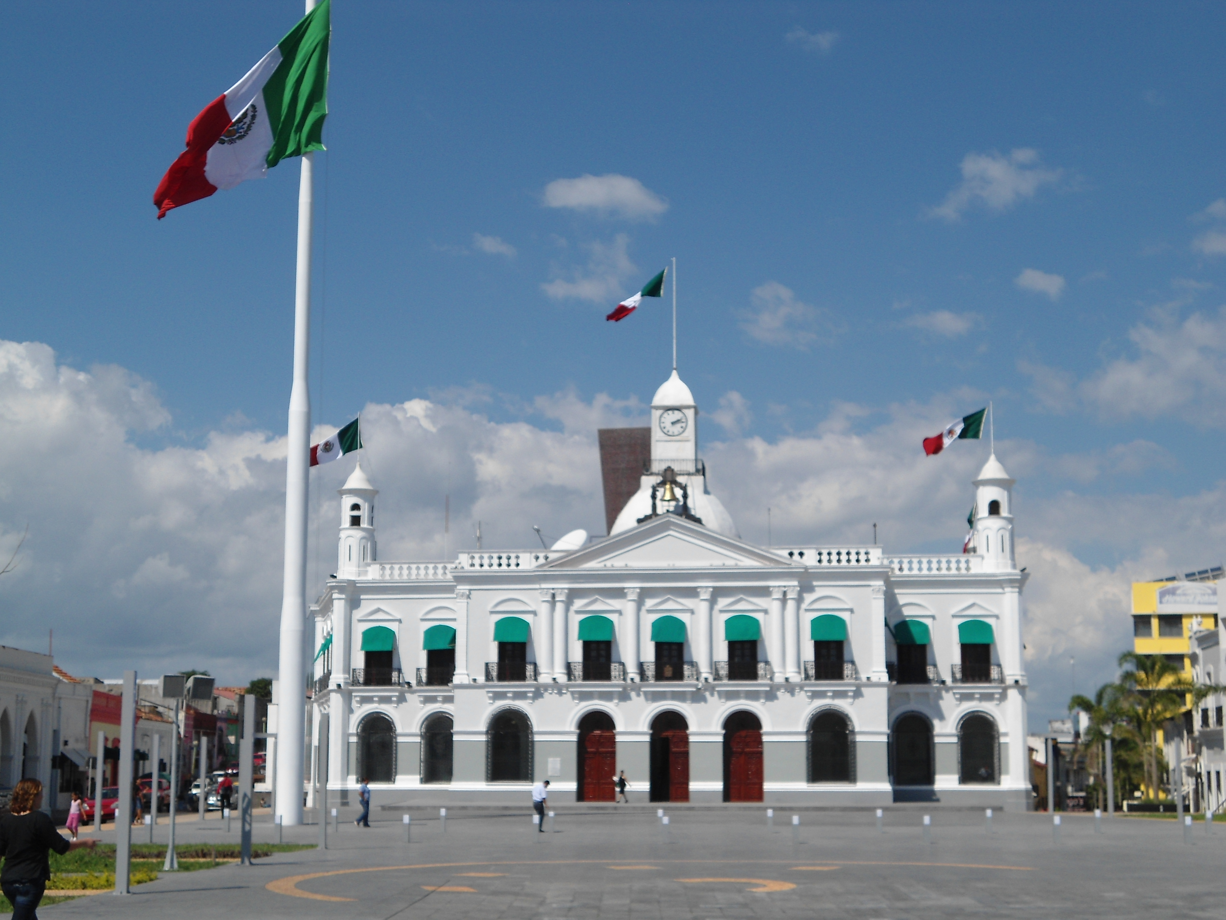 Palacio de Gobierno de Tabasco y asta bandera monumental. Plaza de Armas, Villahermosa, Tabasco, México.